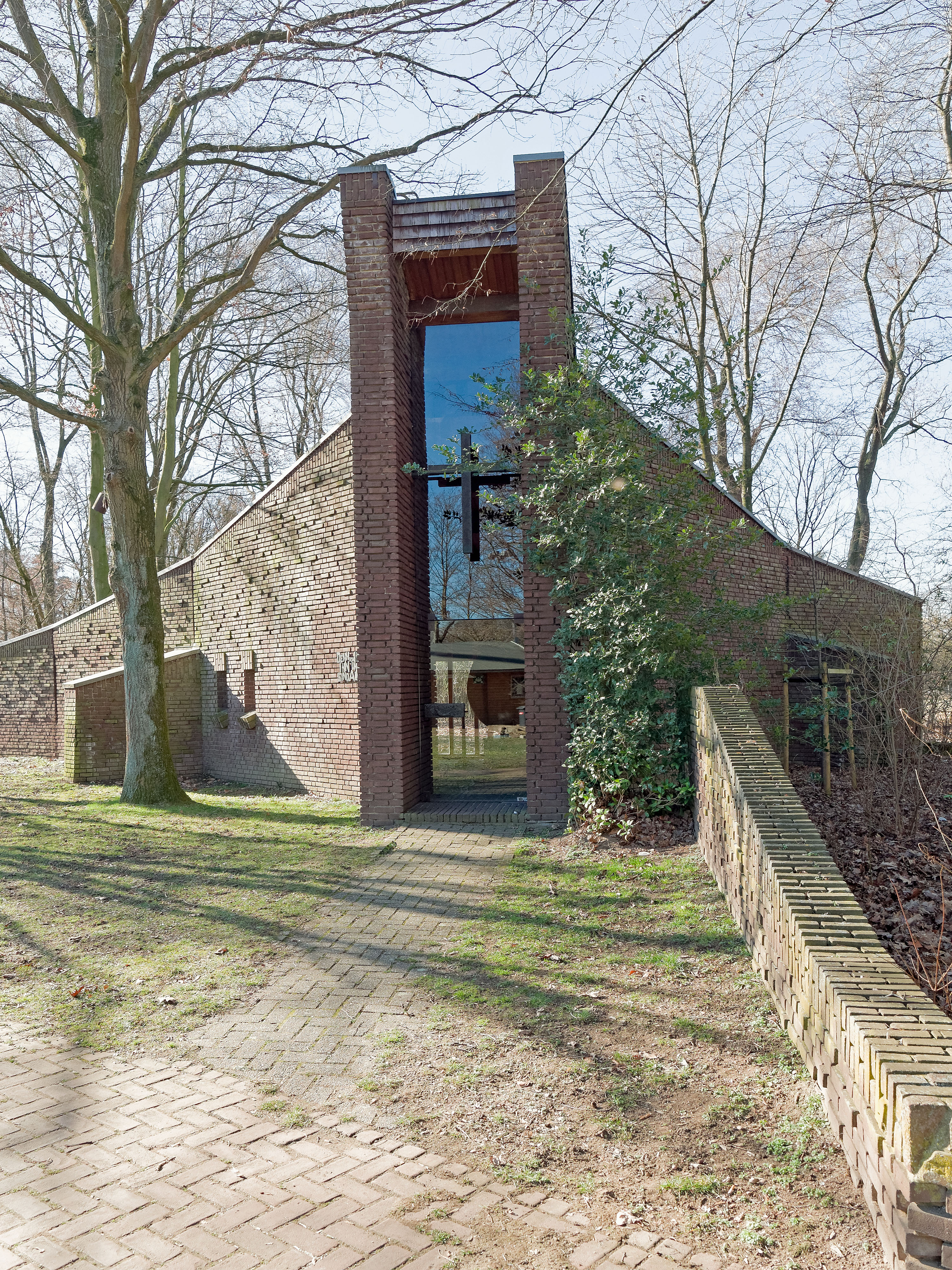 Krefeld Denkmal 960: Autobahnkapelle Geismühle